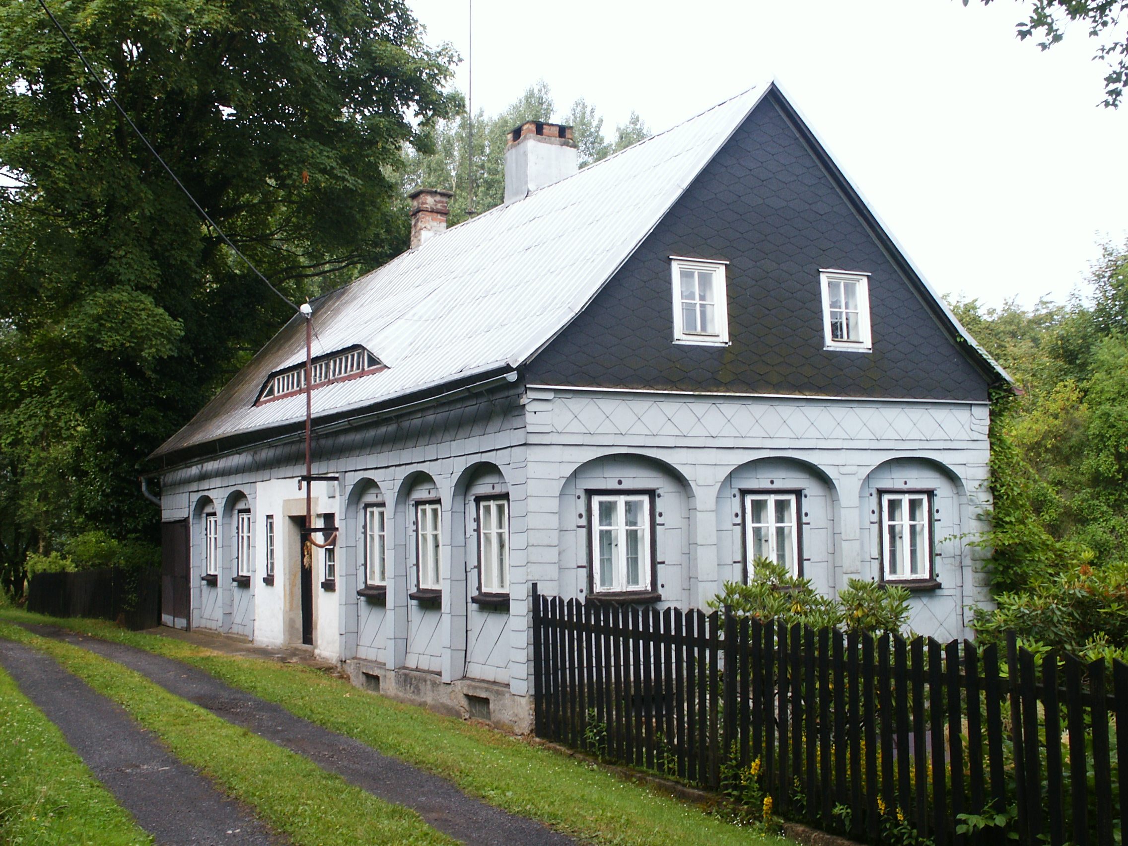 Kamenná Horka - č.p. 51